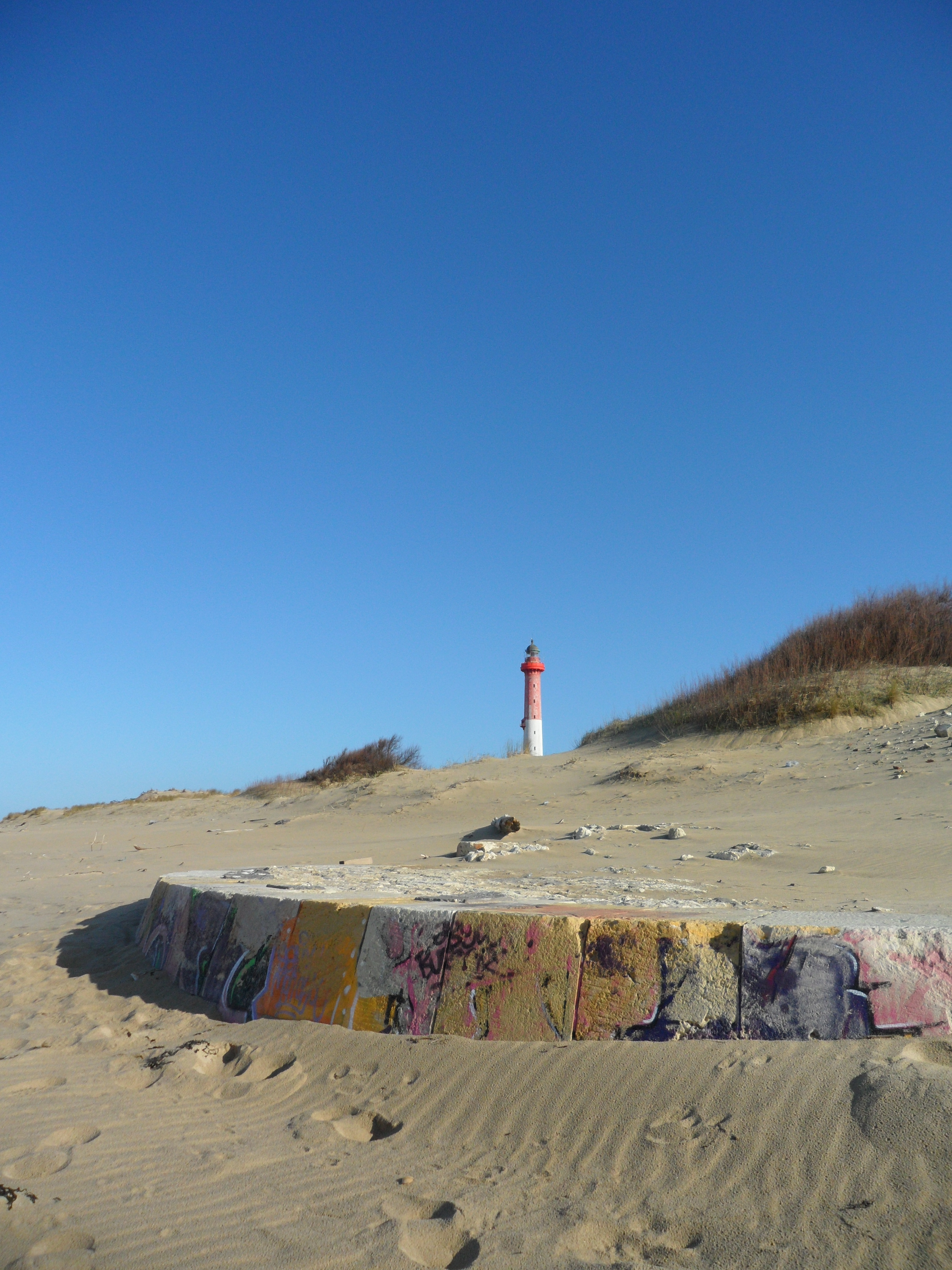 Ruine de l'ancien Sémaphore en 2012 devant le phare de la Coubre.